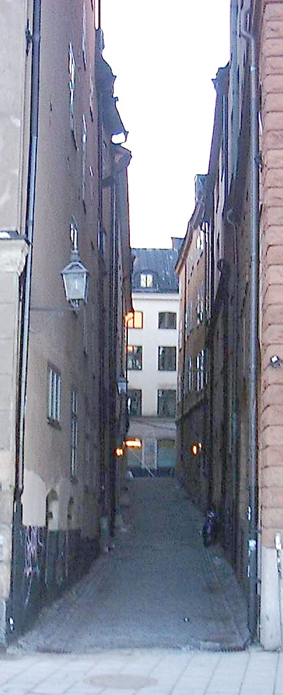 Norra Dryckesgränd in Gamla stan, Stockholm